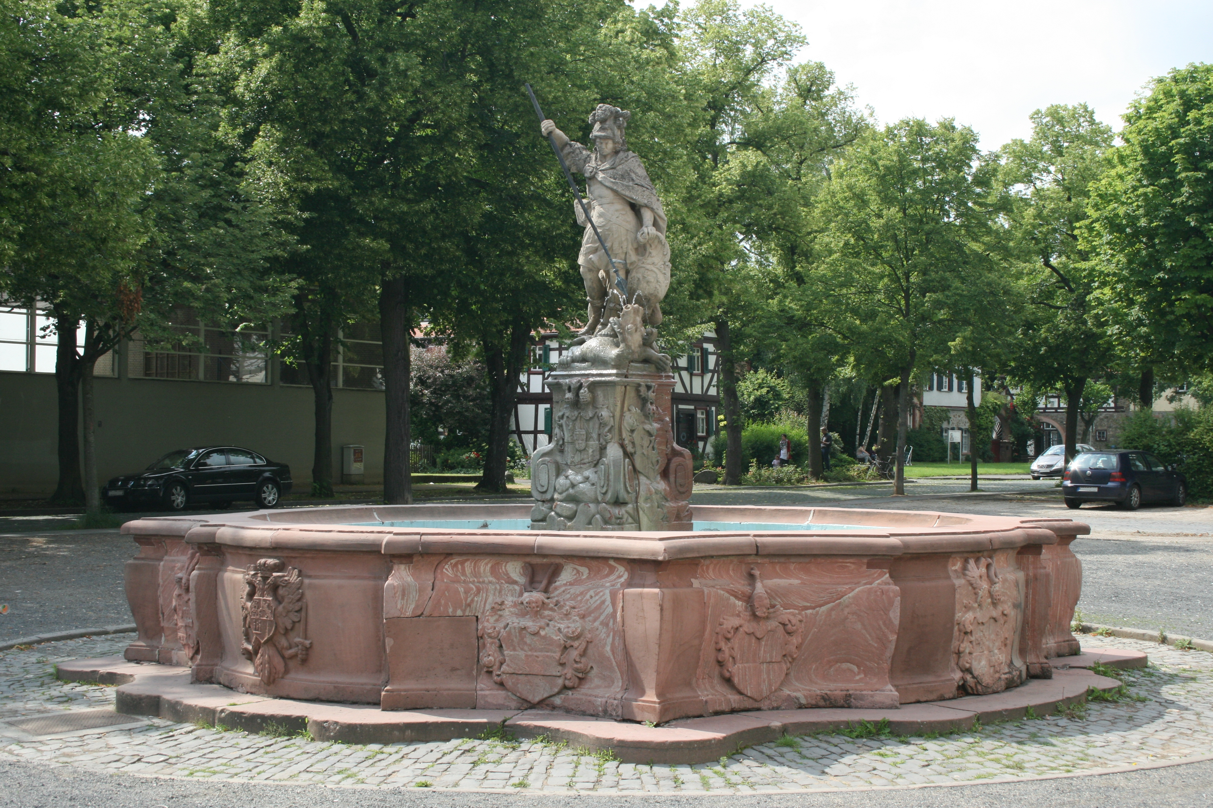 Georgsbrunnen in der Burg Friedberg, Ansicht von Südosten.